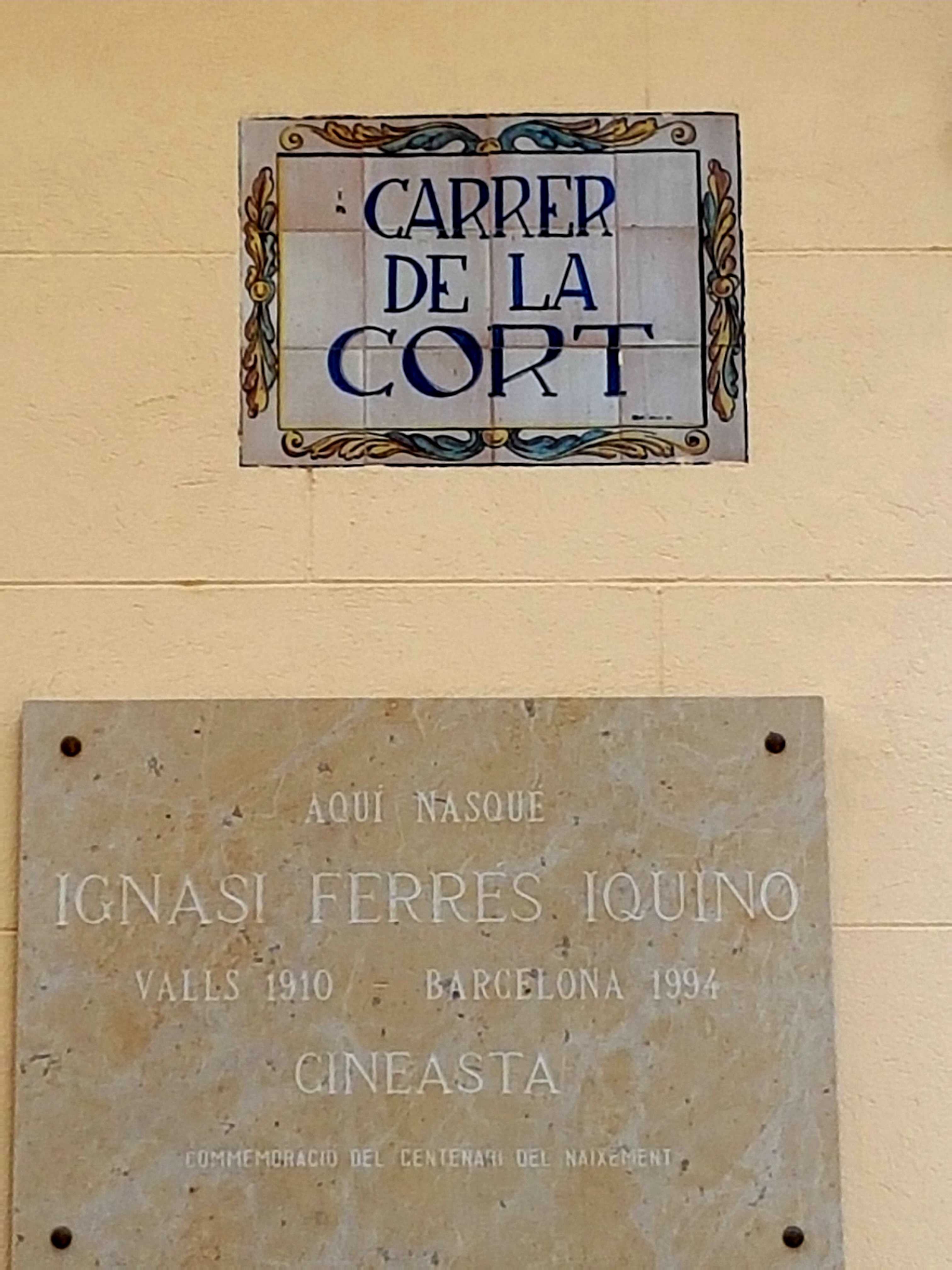 Placa conmemorativa de la calle natal del cineasta Ignacio Iquino en la localidad de Valls